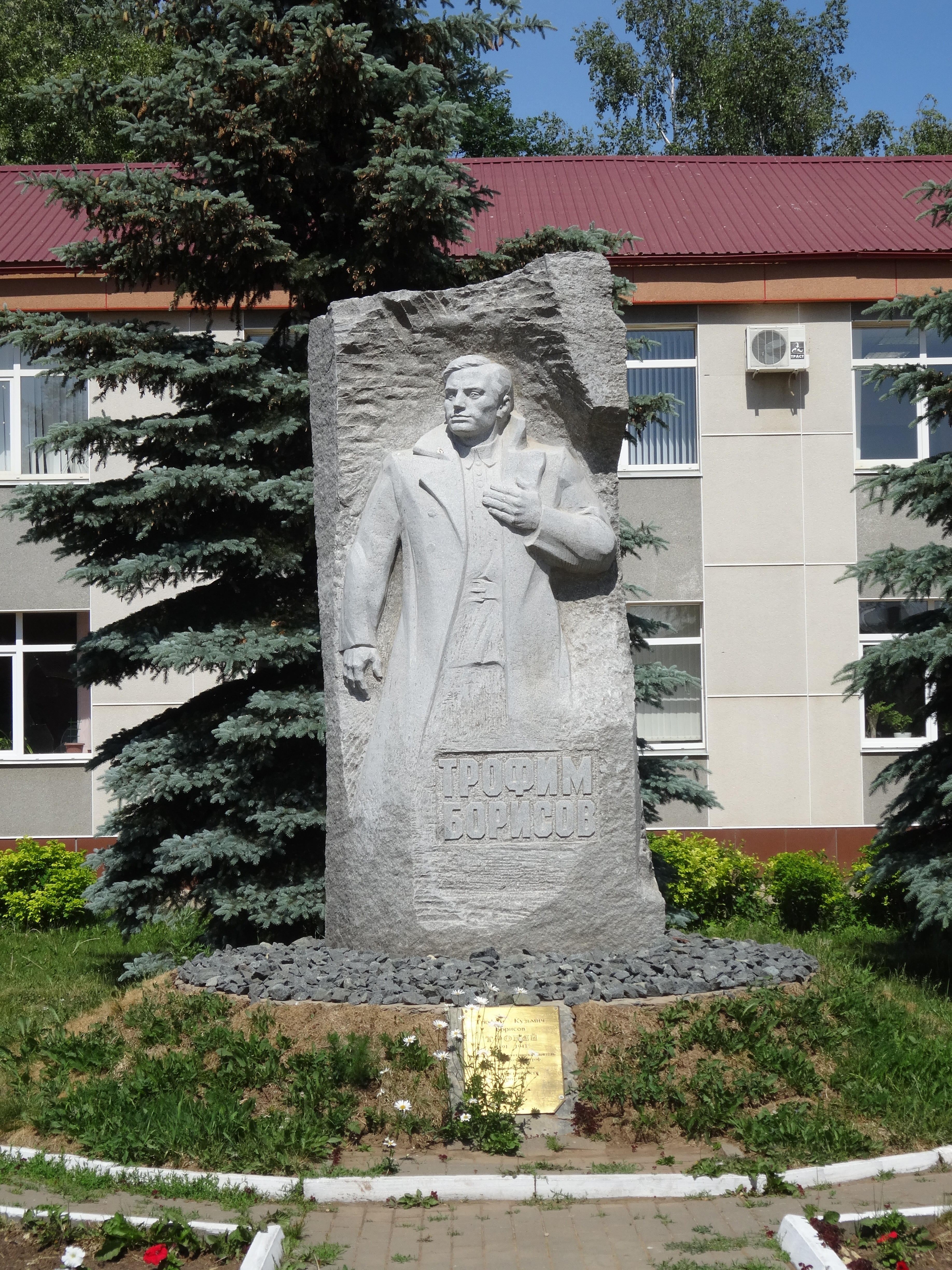 Trokaj Borisov